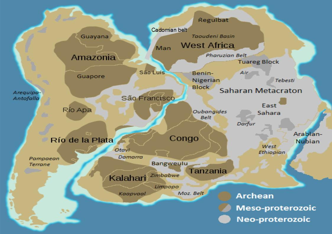 Ceinture orogénique cadomienne.